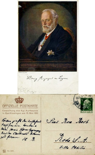 Offizielle Sonderpostkarte zur Einweihung des Bad Kissinger Regentenbaues am 15. Mai 1913. Vorderseite: Ludwig III. von Bayern, damals noch Prinzregent. Rückseite: offizieller Hinweis auf den Anlass der Ausgabe